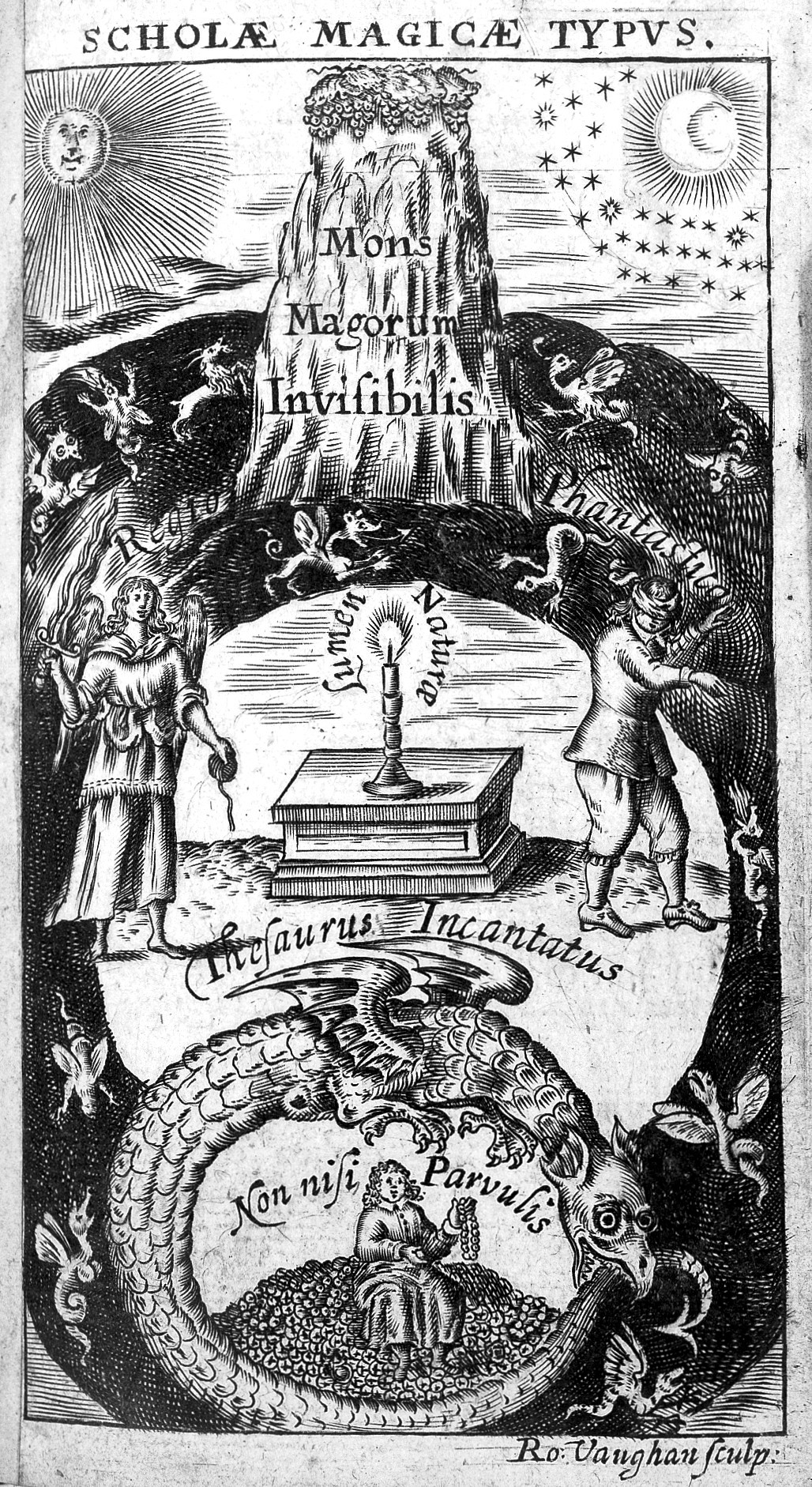 Illustrazione dalla pagina 23 dell'edizione Lumen de lumine di Thomas Vaughan (Eugenius Philalethes), che raffigura l'emblema del Santuario della Dea Thalia con altri simboli alchemici come la Montagna Invisibile, il Serpente Uroboro, una Lampada singola su un altare, l'Angelo con un Spada, ecc.[1]